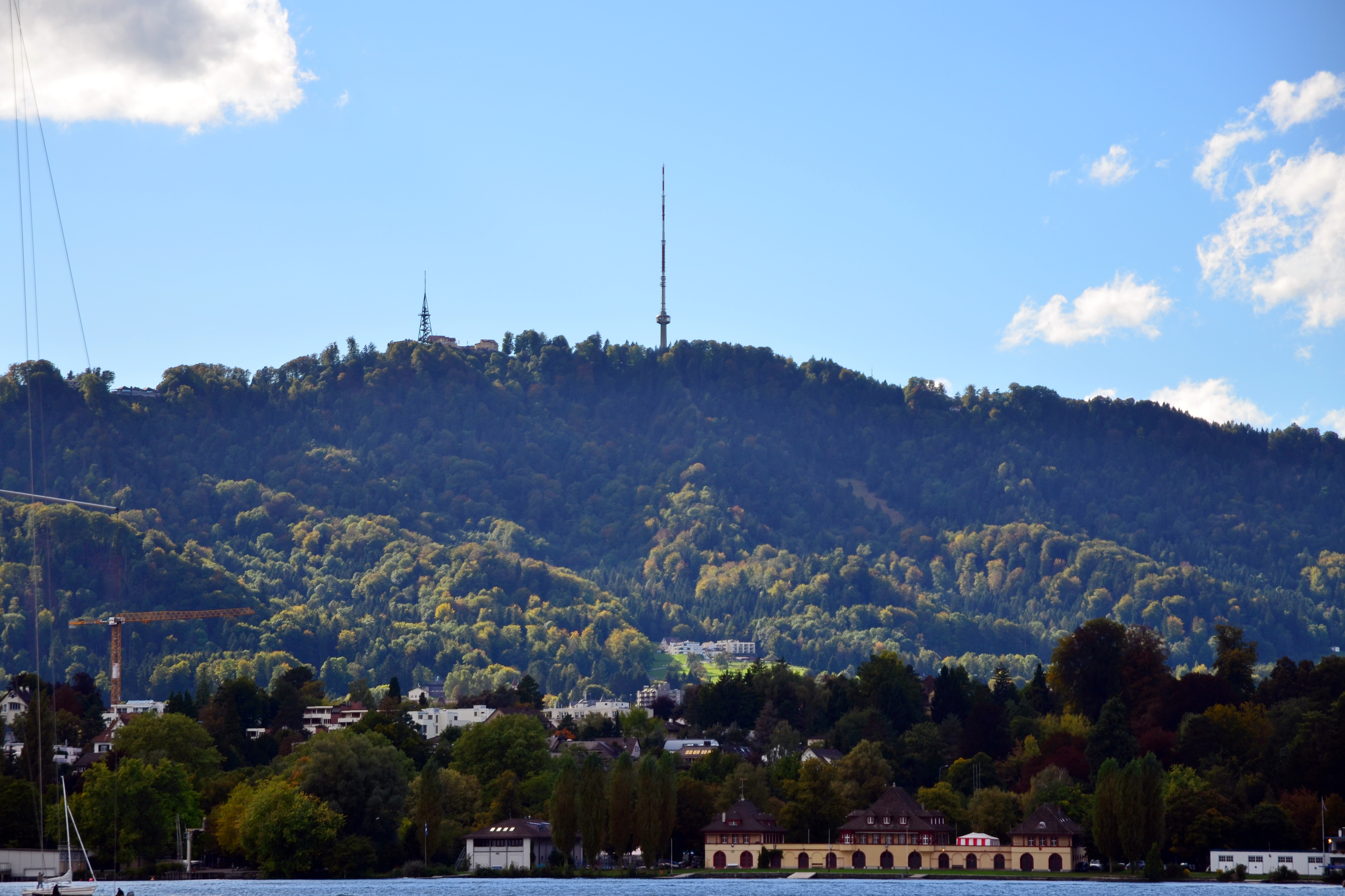 Üetliberg (prähistorische Siedlungen und Bestattungsplätze, römische Siedlung, mittelalterliche Burg, Befestigungsanlagen)